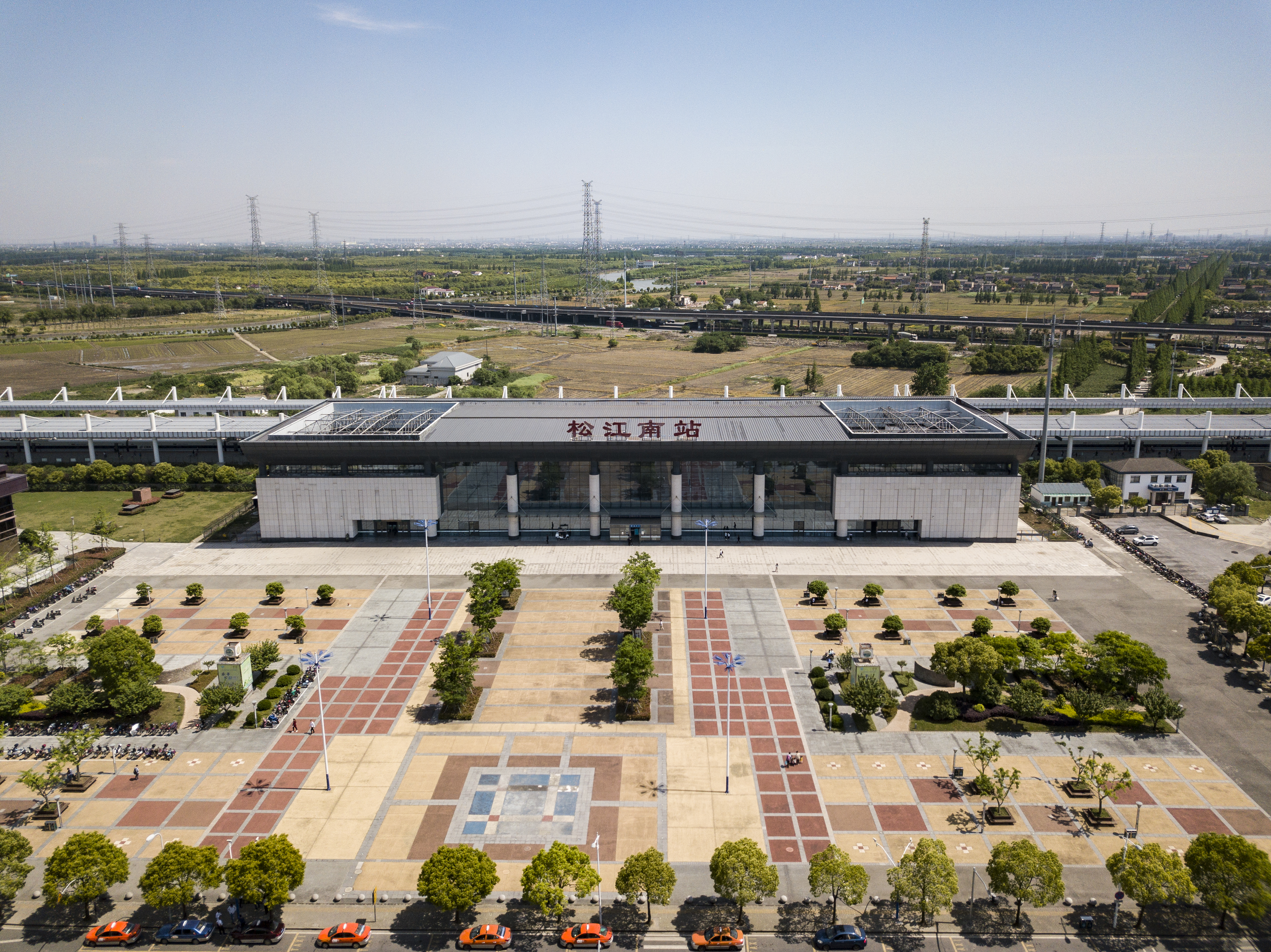 中文（中国大陆）: 松江南站及广场·航拍